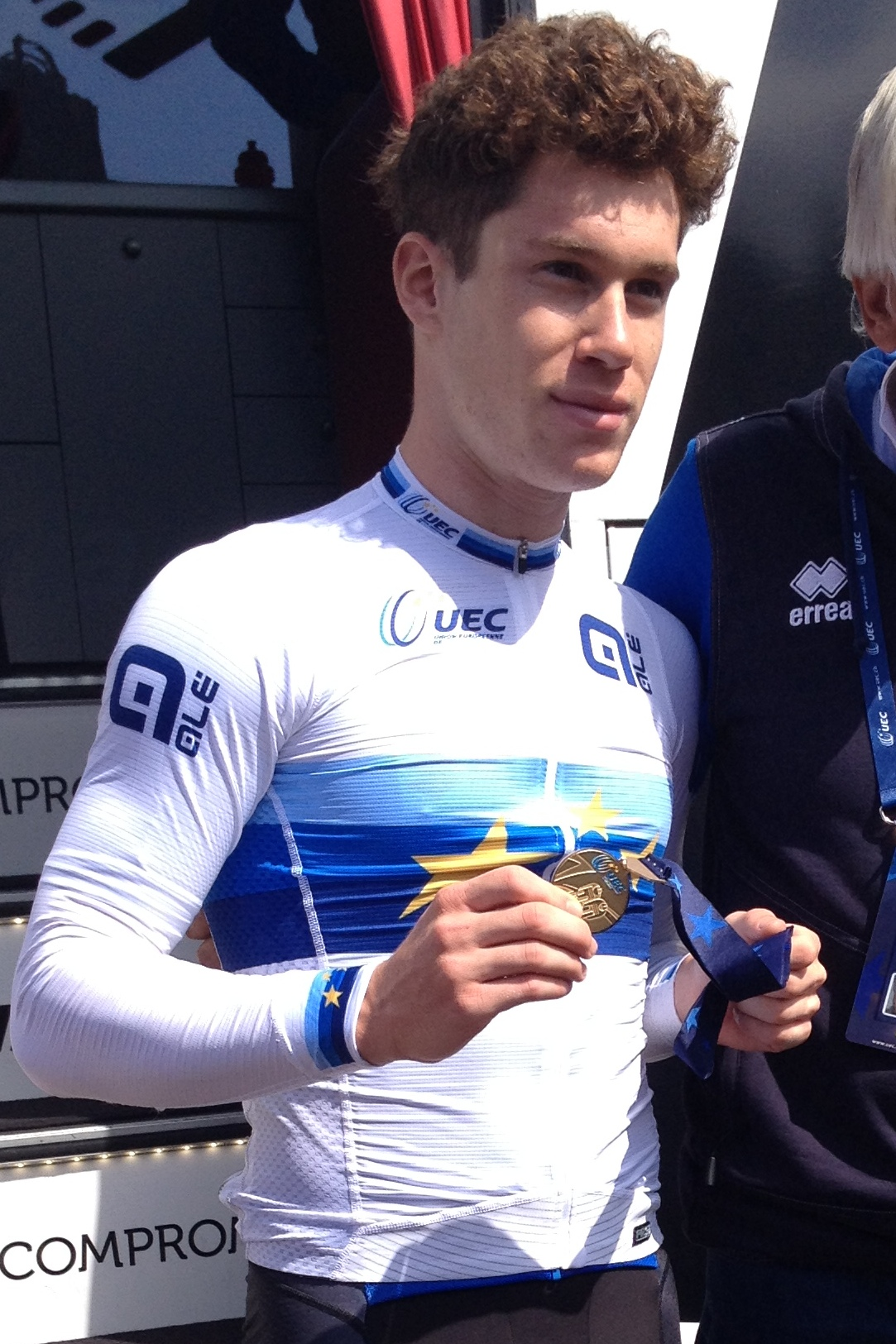 Wegwedstrijd voor mannen beloften tijdens de Europese kampioenschappen wielrennen in Alkmaar op zaterdag 10 augustus 2019.